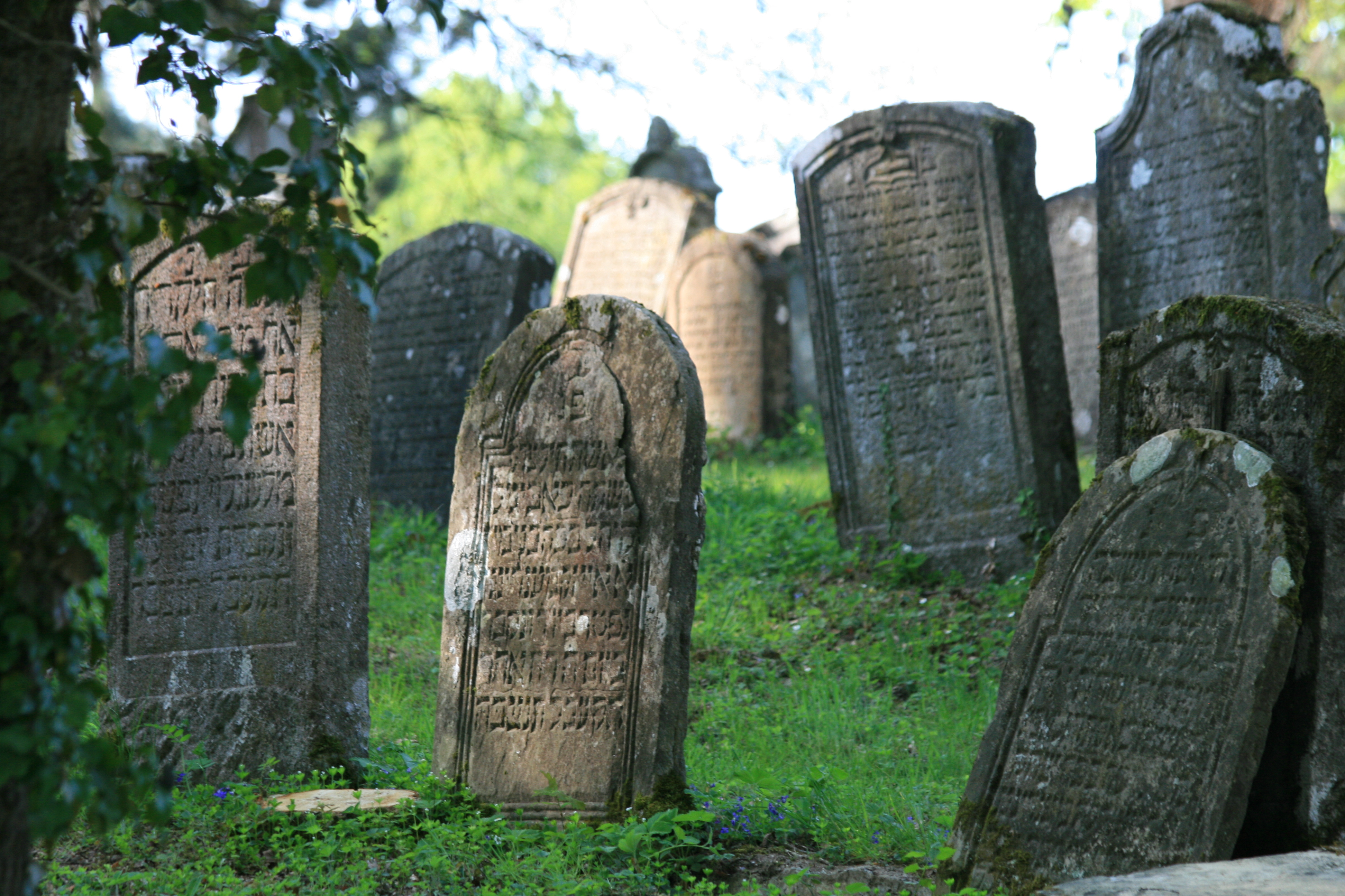 Jüdischer Friedhof Endingen